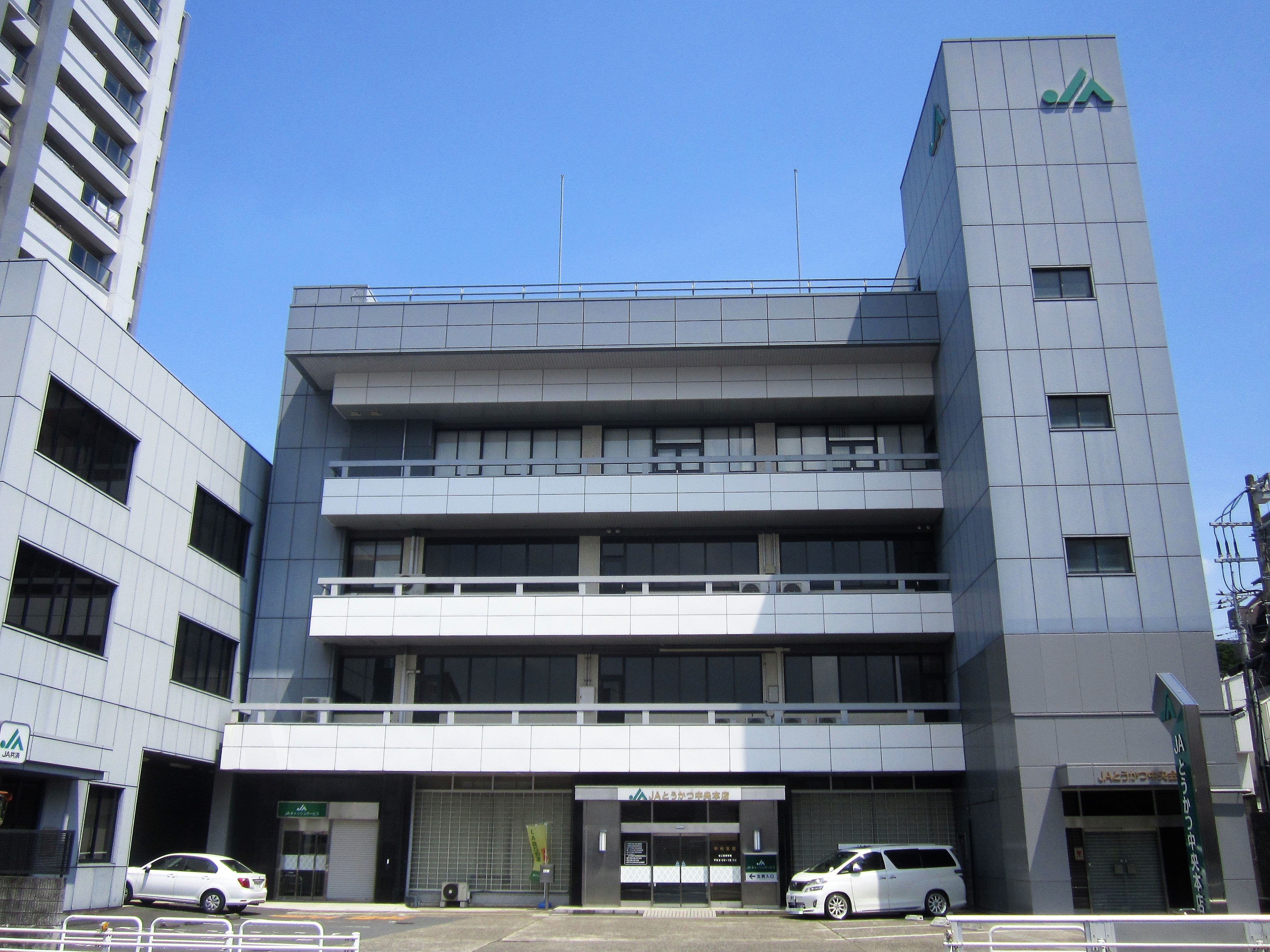 とうかつ中央農業協同組合 本店・中央支店（松戸市上本郷） Canon PowerShot A2200